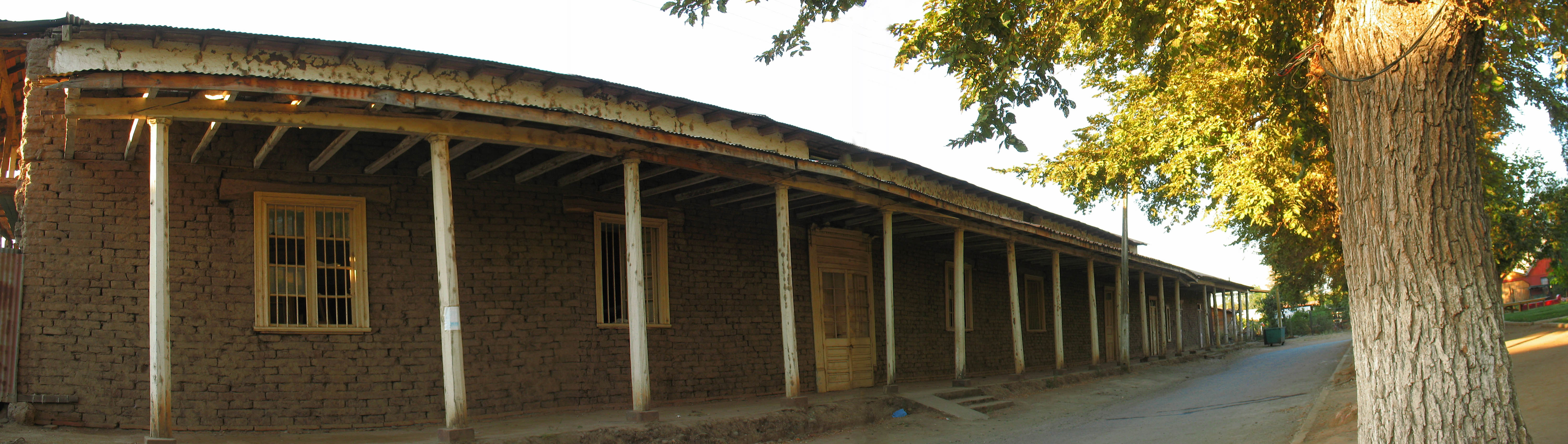 Villa Prat casa vieja